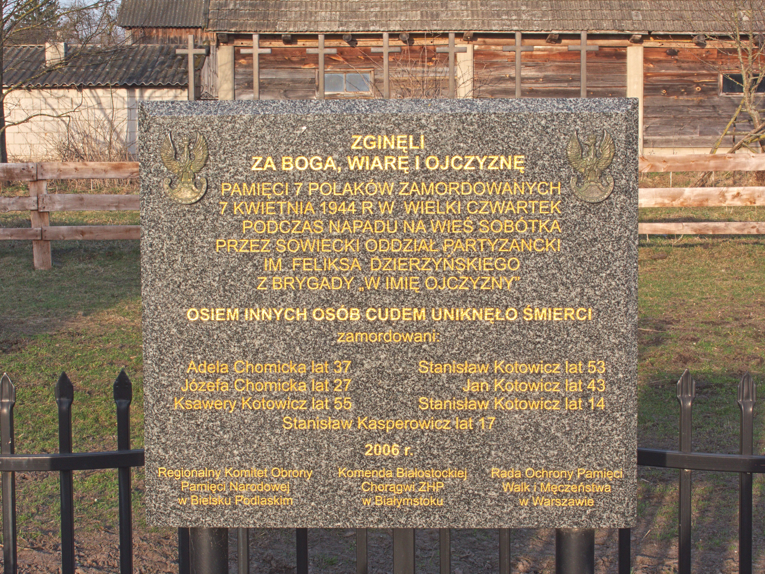 Pomnik w Sobótce.